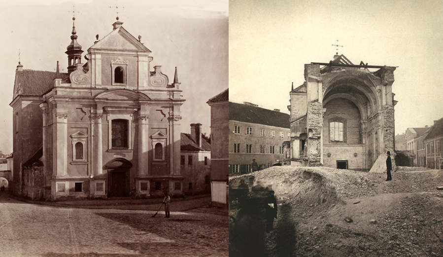 Беларуская (тарашкевіца): Маскалізацыя (русіфікацыя) Вялікага Княства Літоўскага. Места Вільня. Касьцёл Язэпа Рамесьніка, помнік архітэктуры барока XVII стагодзьдзя: аўтэнтычны выгляд (налева) і ў час руйнаваньня расейскімі ўладамі (направа)